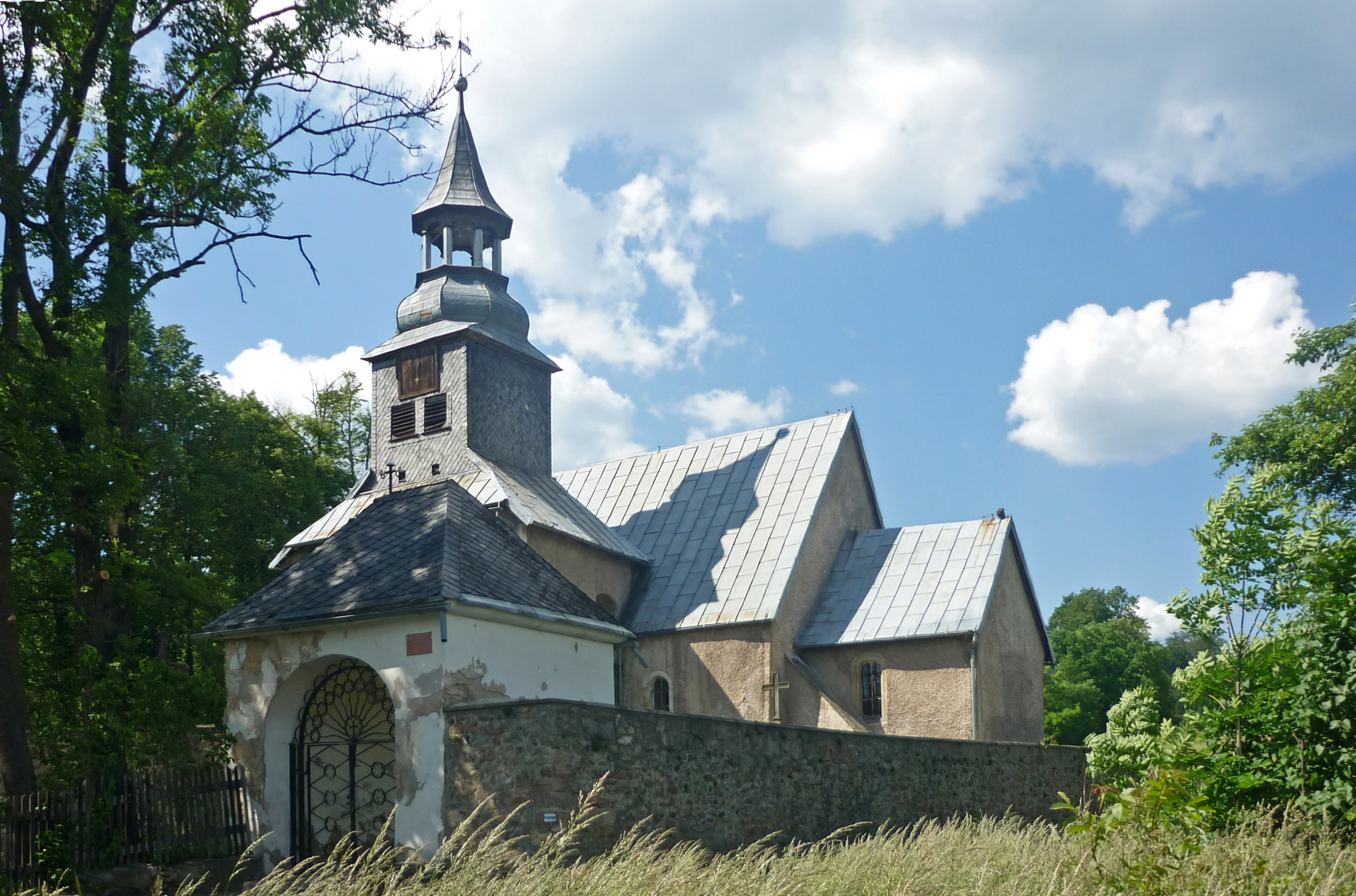 Martinskirche in Bukowiec (Buchwald) im Riesengebirge / Polen